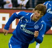 Andrei Arshavin, Russian footballer.